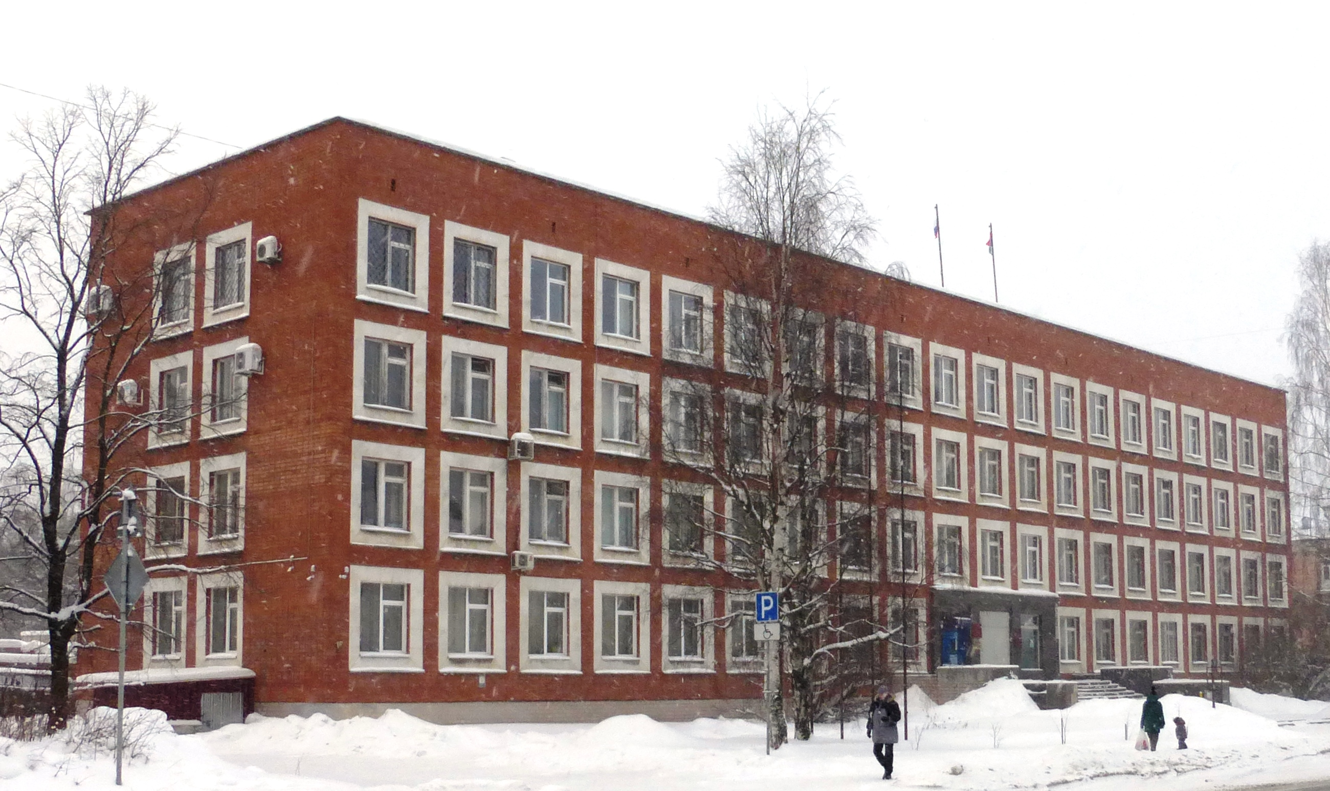 Здание администрации Прионежского района Карелии в г. Петрозаводске на ул. Правды